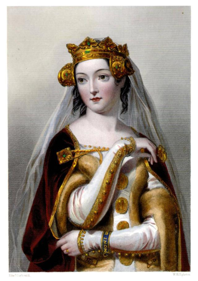 Queen Philippa of Hainault